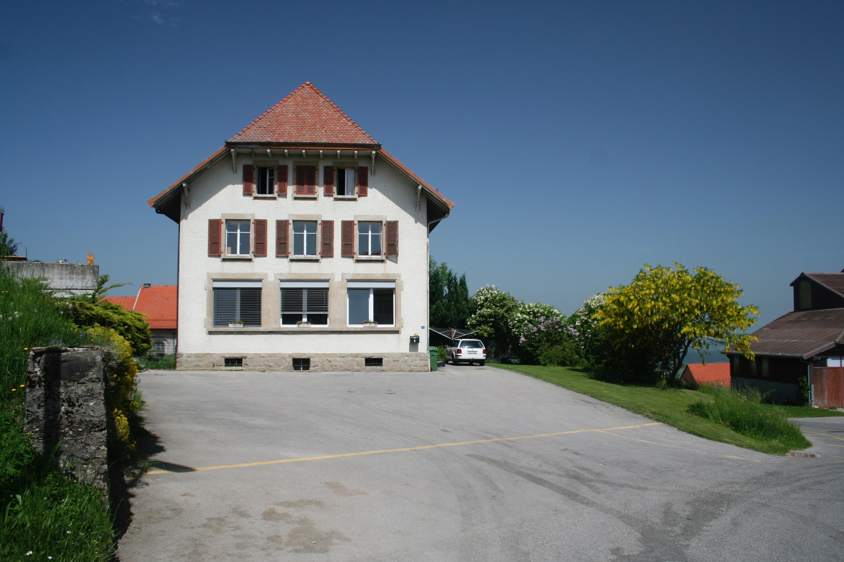 Ecole de Sommentier